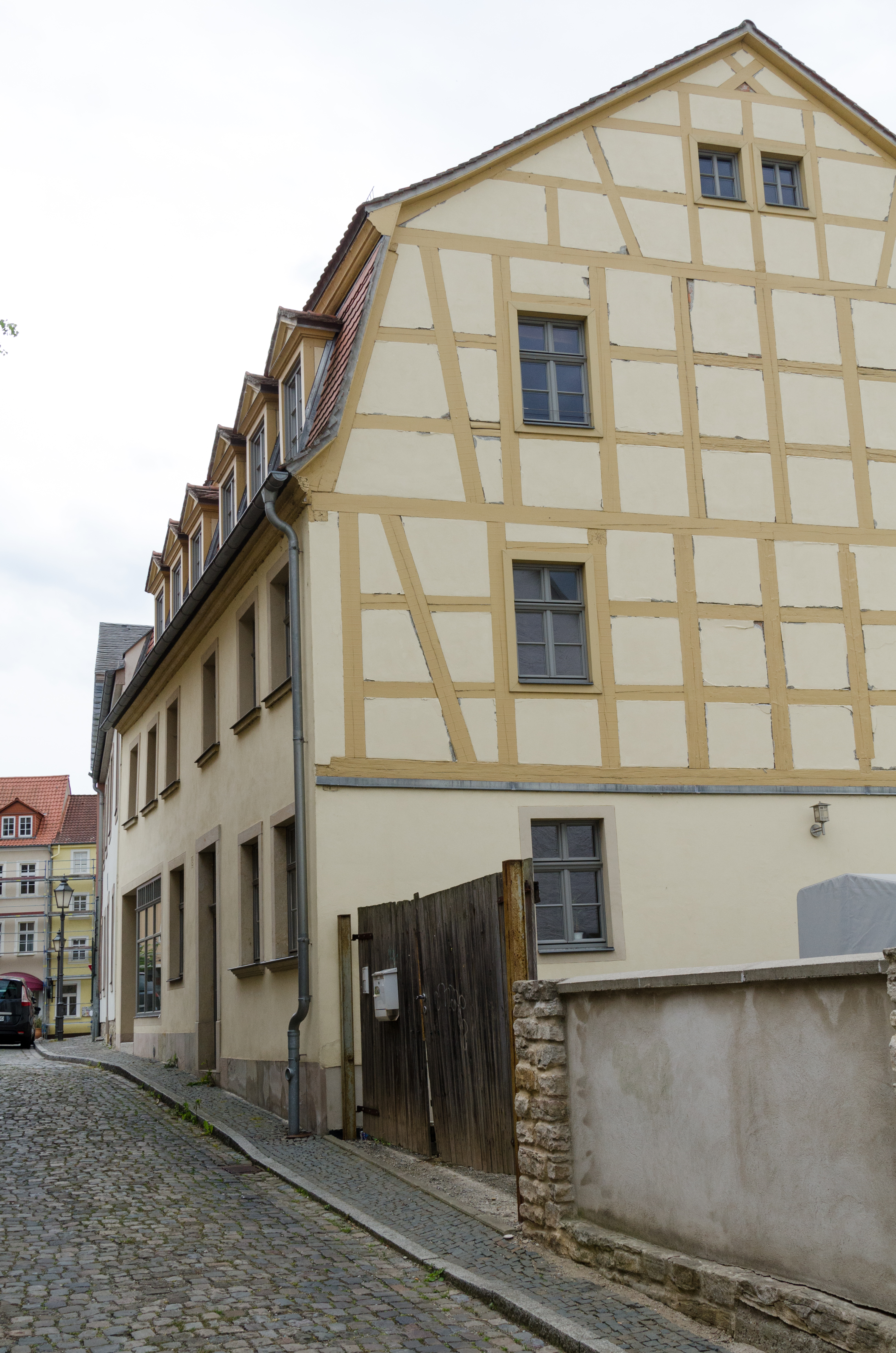 Zeitz, Ritterstraße 18